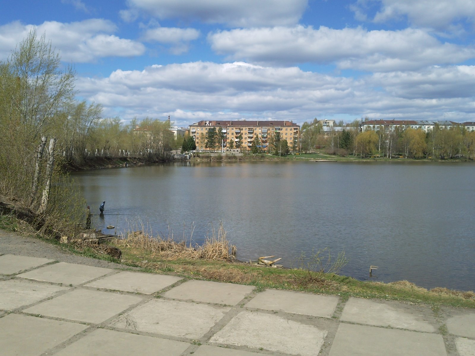 Lysva, Perm Krai, Russia